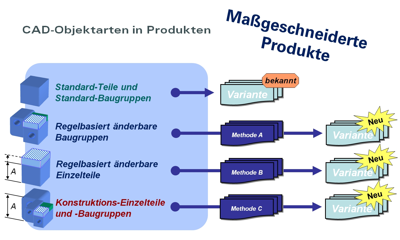 Die Grafik veranschaulicht, aus welchen Objekten maßgeschneiderte Produkte bestehen können. Die Komplexität nimmt von oben nach unten zu. Durch entsprechende Verfahren und Methoden eines Produktkonfigurators mit CAD-Automation entstehen aus einem Vorrat von Objekten (auftragsneutrale Vorlagen, Master,...) automatisch neue Produkte.